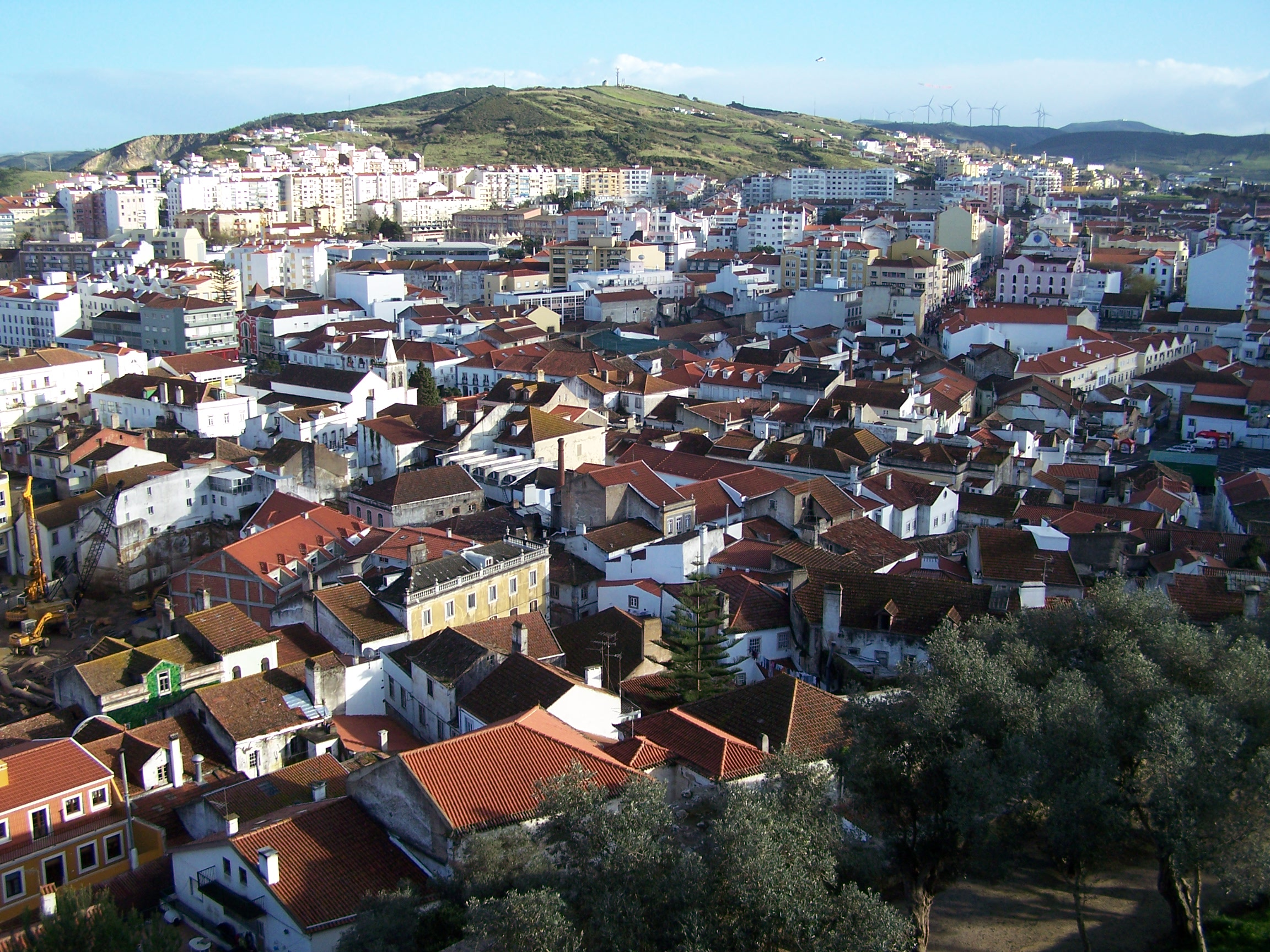 Torres Vedras, vista do Castelo de Torres Vedras